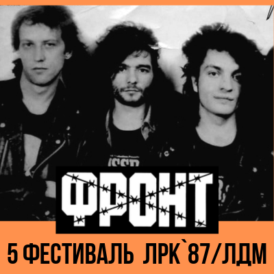 Сергей Станков, Борис Вильчик, Владимир Костылев